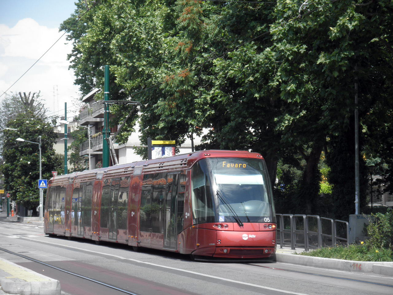 Tram alla fermata Volturno.